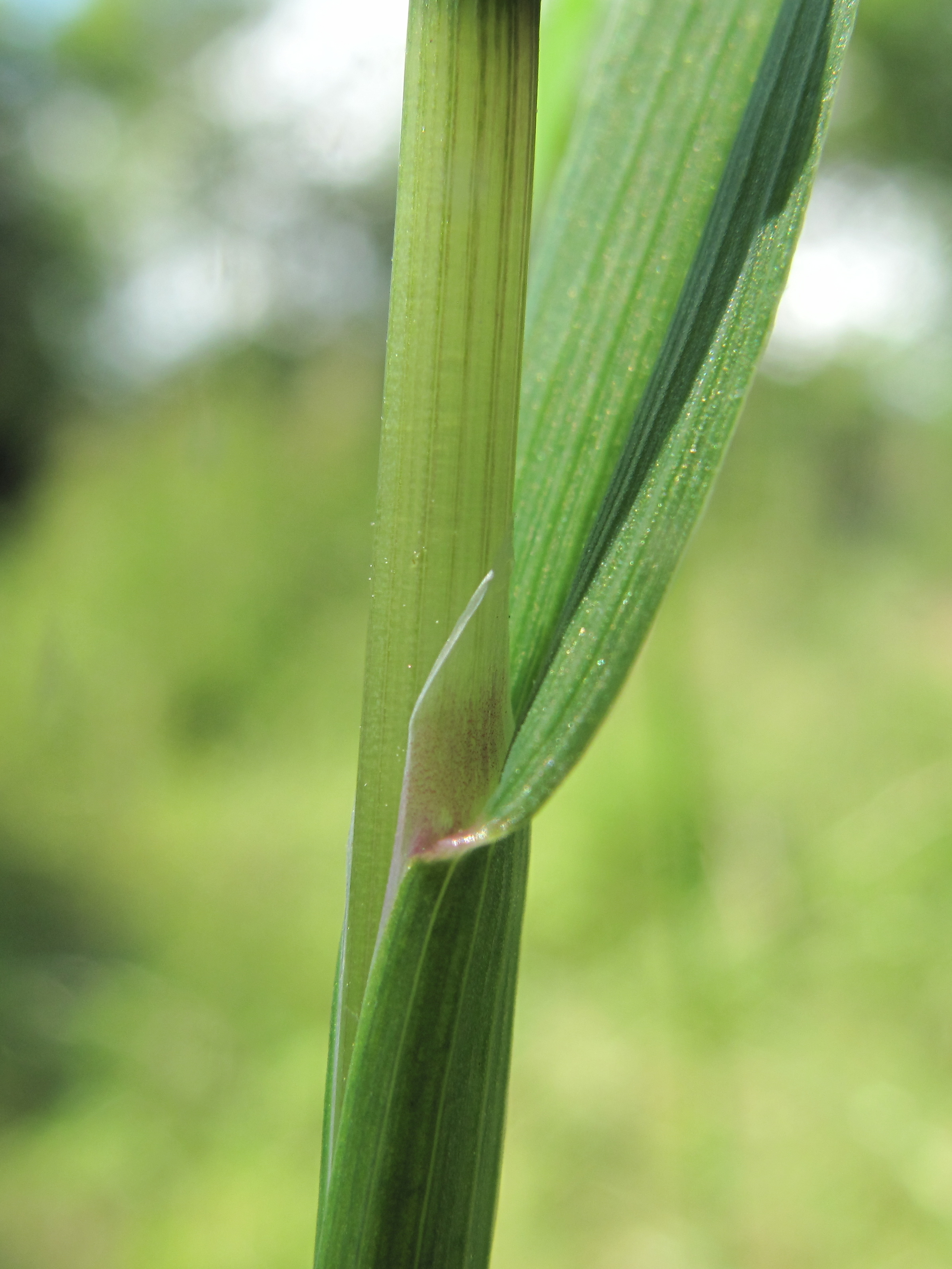 Catabrosa_aquatica